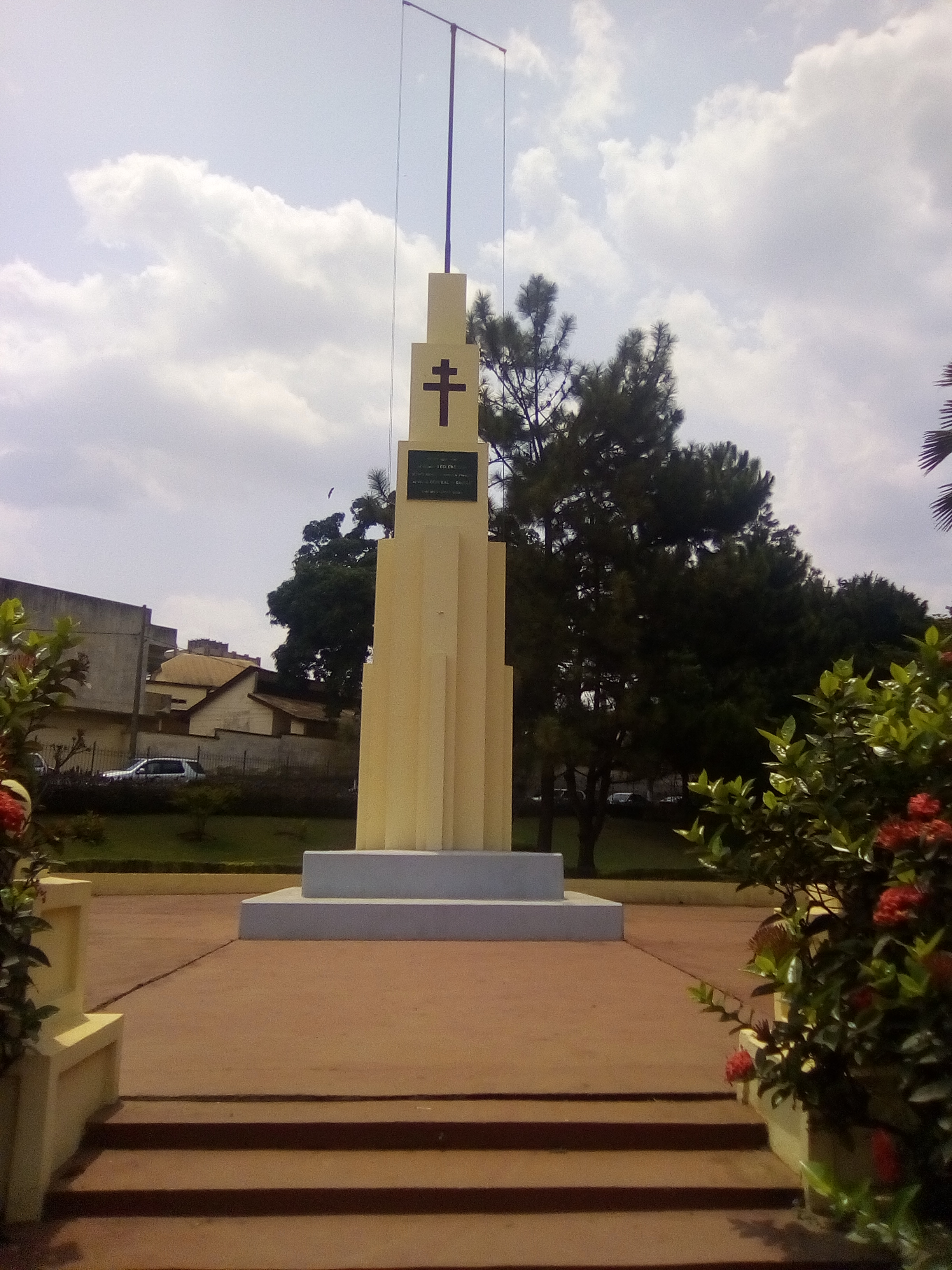 Le monument du colonel Leclerc est un site historique situé en plein cœur de la ville de Yaoundé. Le 27 août 1940, le Colonel Leclerc devient le Commandant du Cameroun français, nommé par le Général De Gaulles.